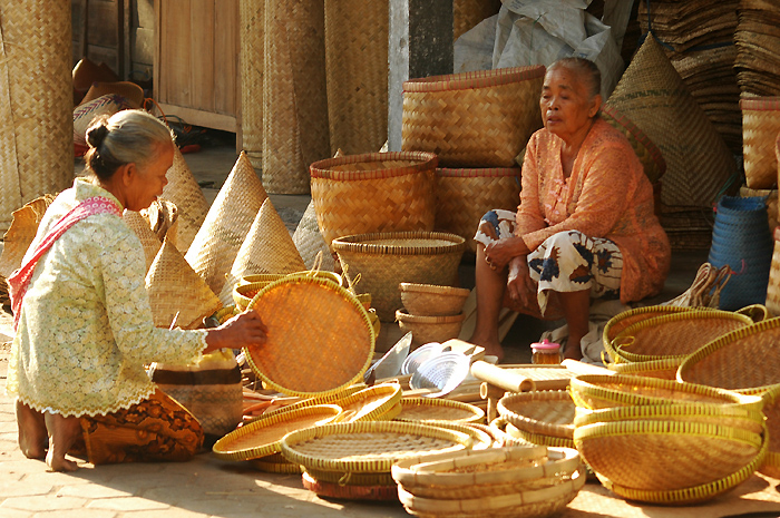 Transaksi antara penjual dan pembeli di suatu pasar tradisional Ngijon, Sleman, Yogyakarta, Indonesia